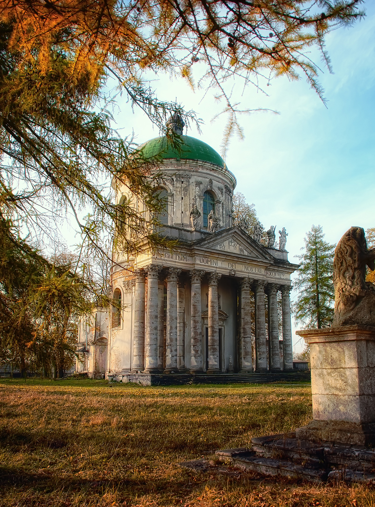 Костел Св. Йосифа (мур.), Підгірці